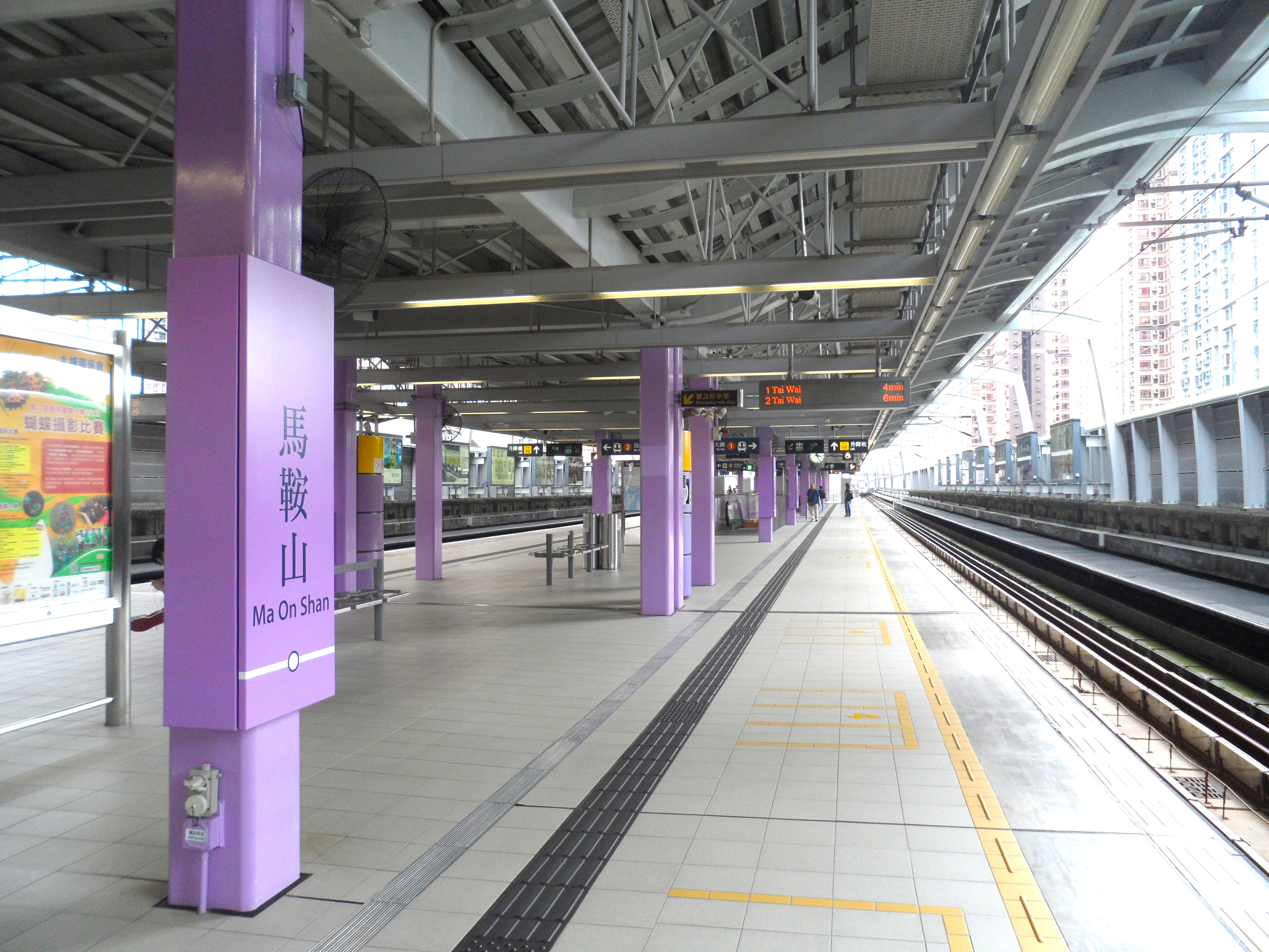 港鐵馬鞍山站一號月台